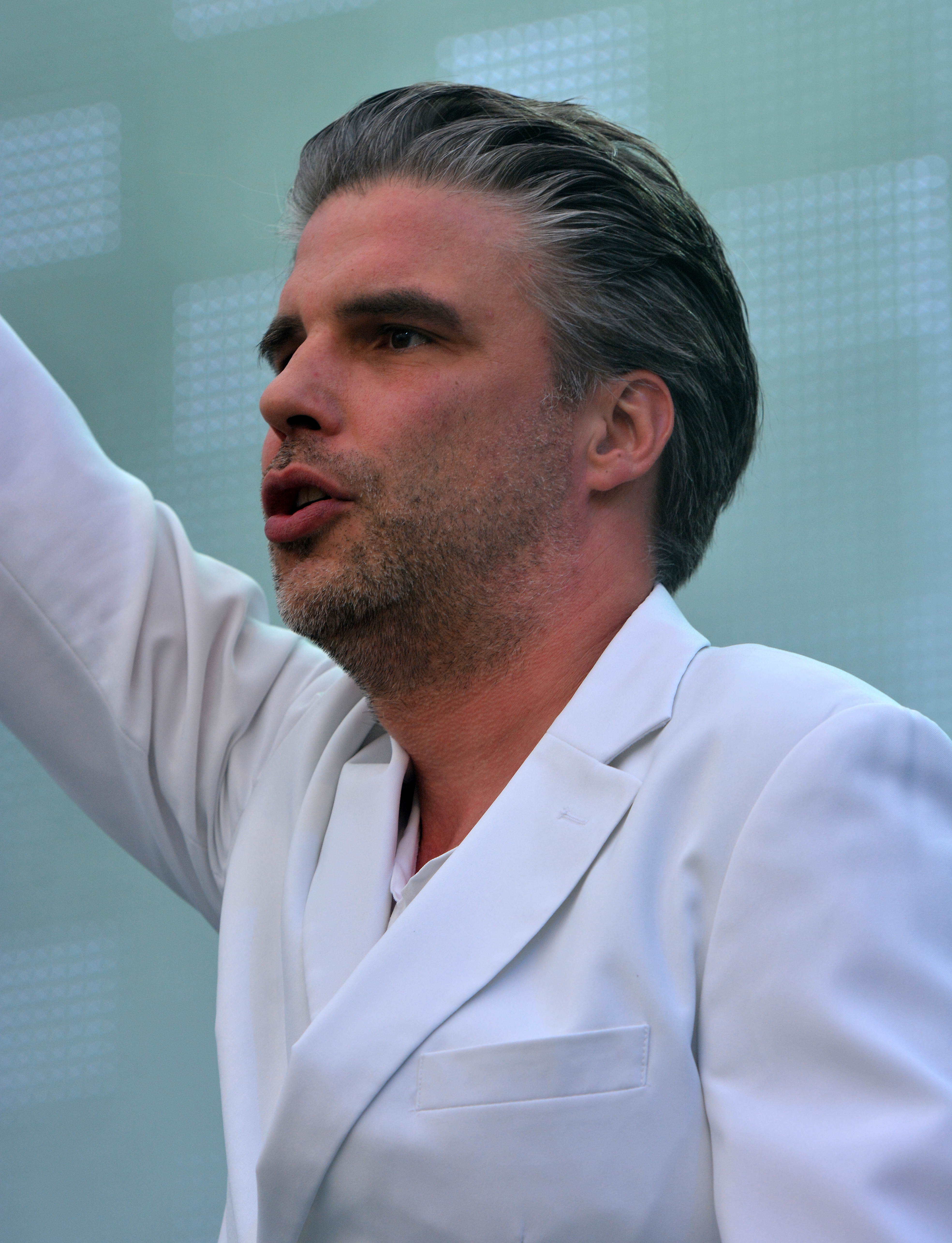 Jens Hardeland von der Kuhlage & Hardeland Morningshowband auf der NDR-Bühne beim 825. Hamburger Hafengeburtstag 2014